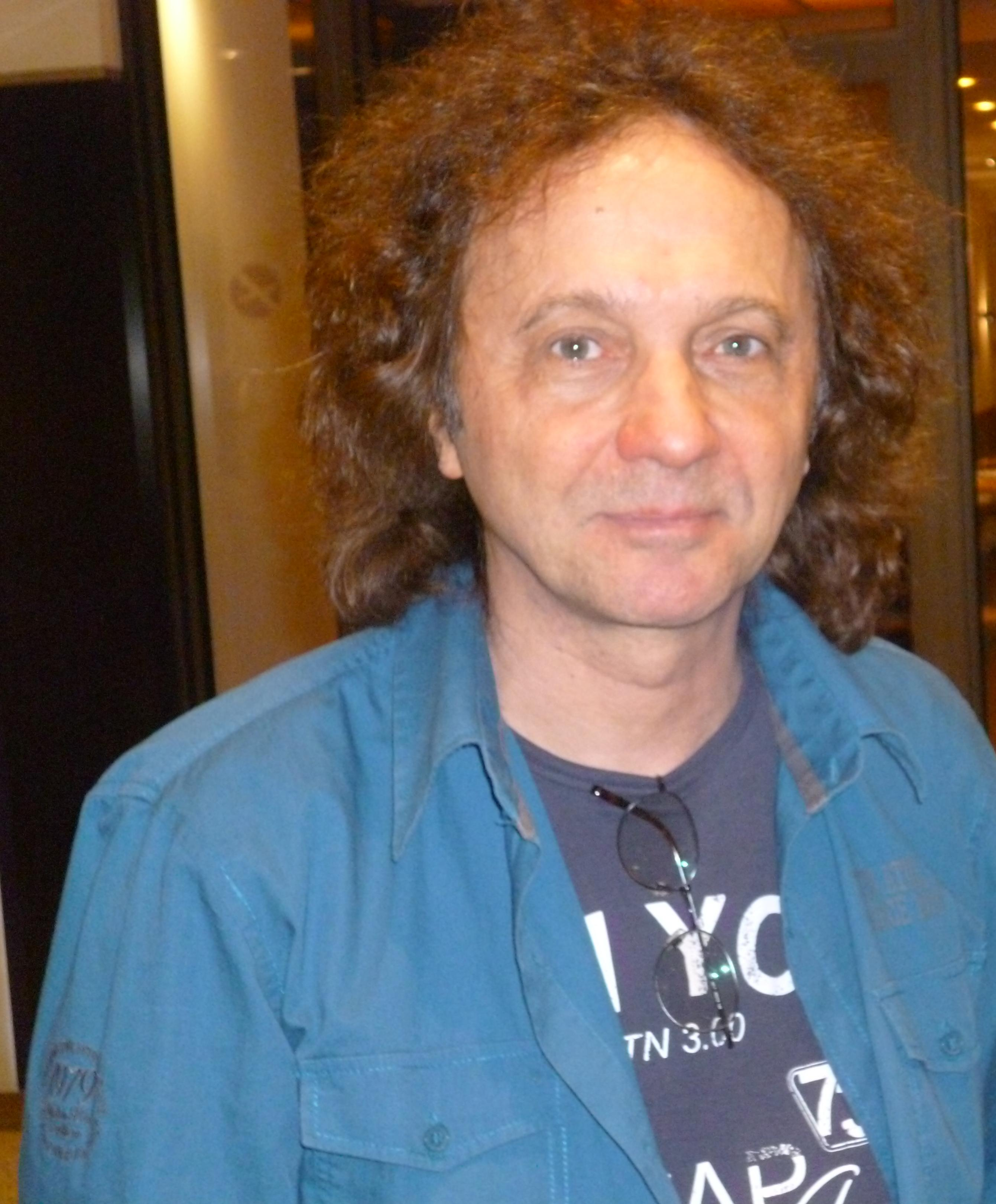 Rudi Buttas, Mitglied der Band Pur